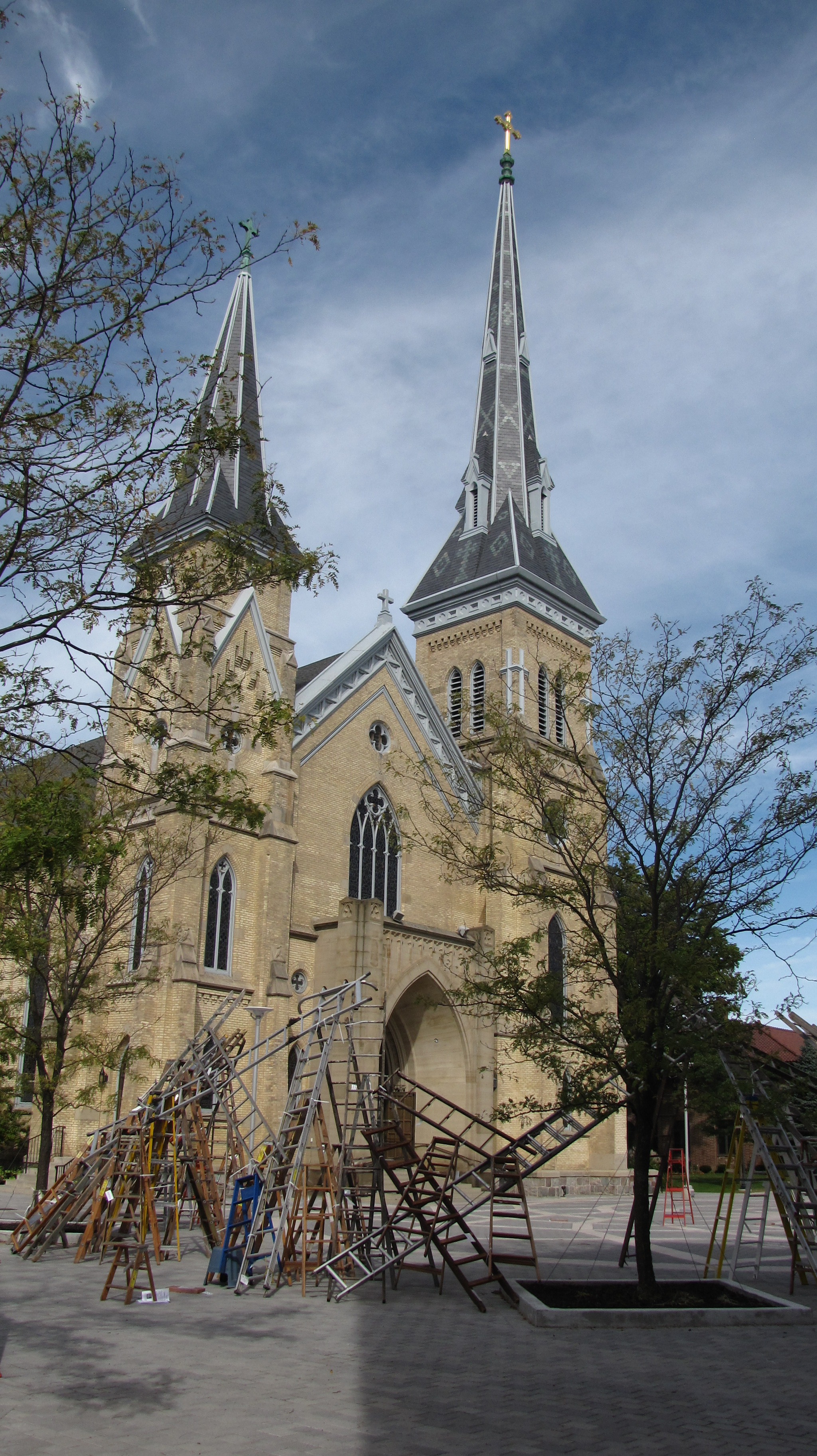 Cattedrale di Sant'Andrea, a Grand Rapids (Michigan) USA.